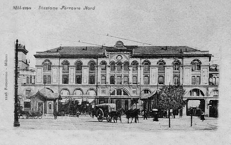 Vers 1900, le bâtiment de la gare Ferrovie Nord à Milan, construit en 1895. Il comporte trois étages.